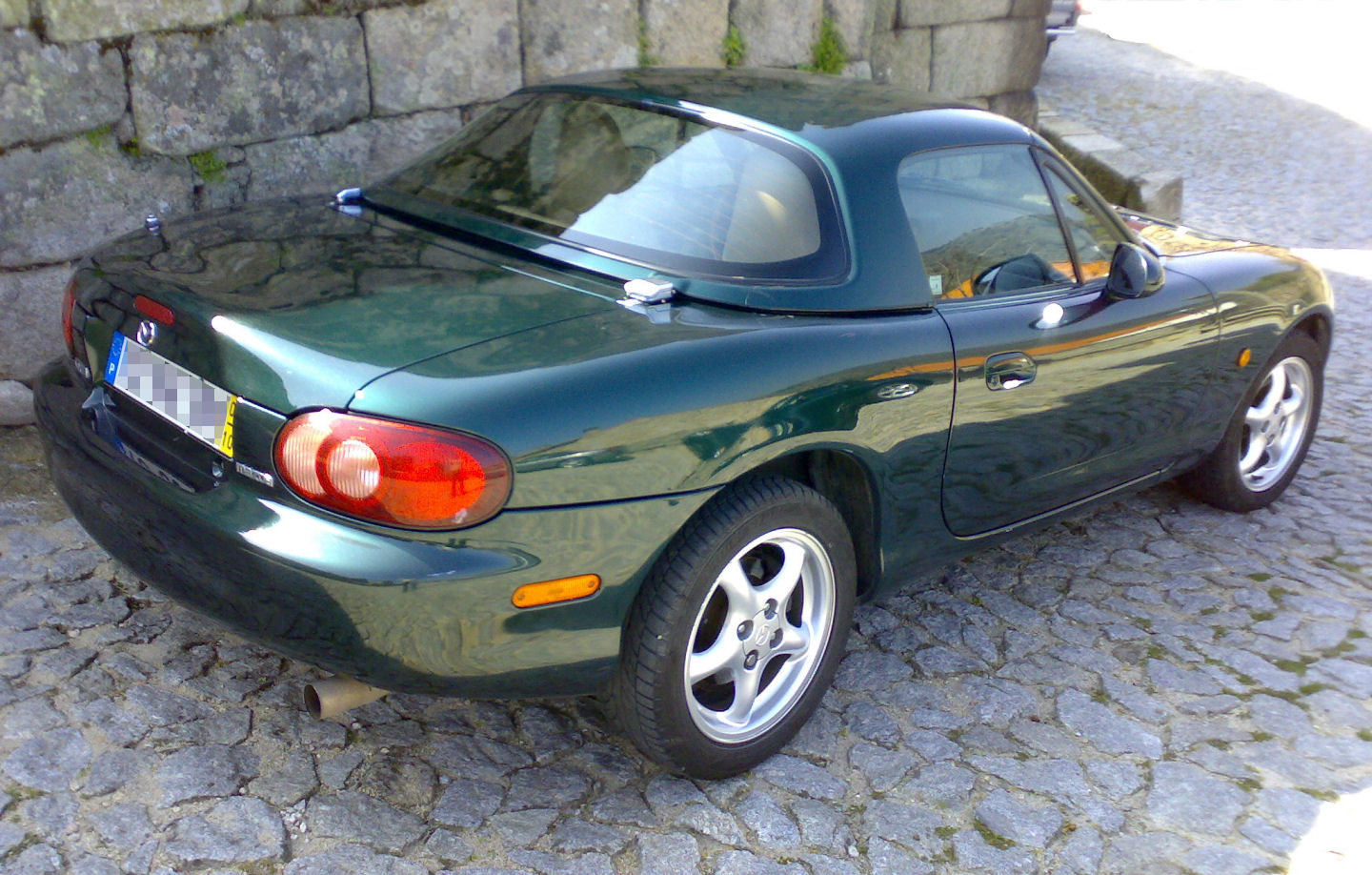 Mazda MX-5 1999-2004 Emerald Mica